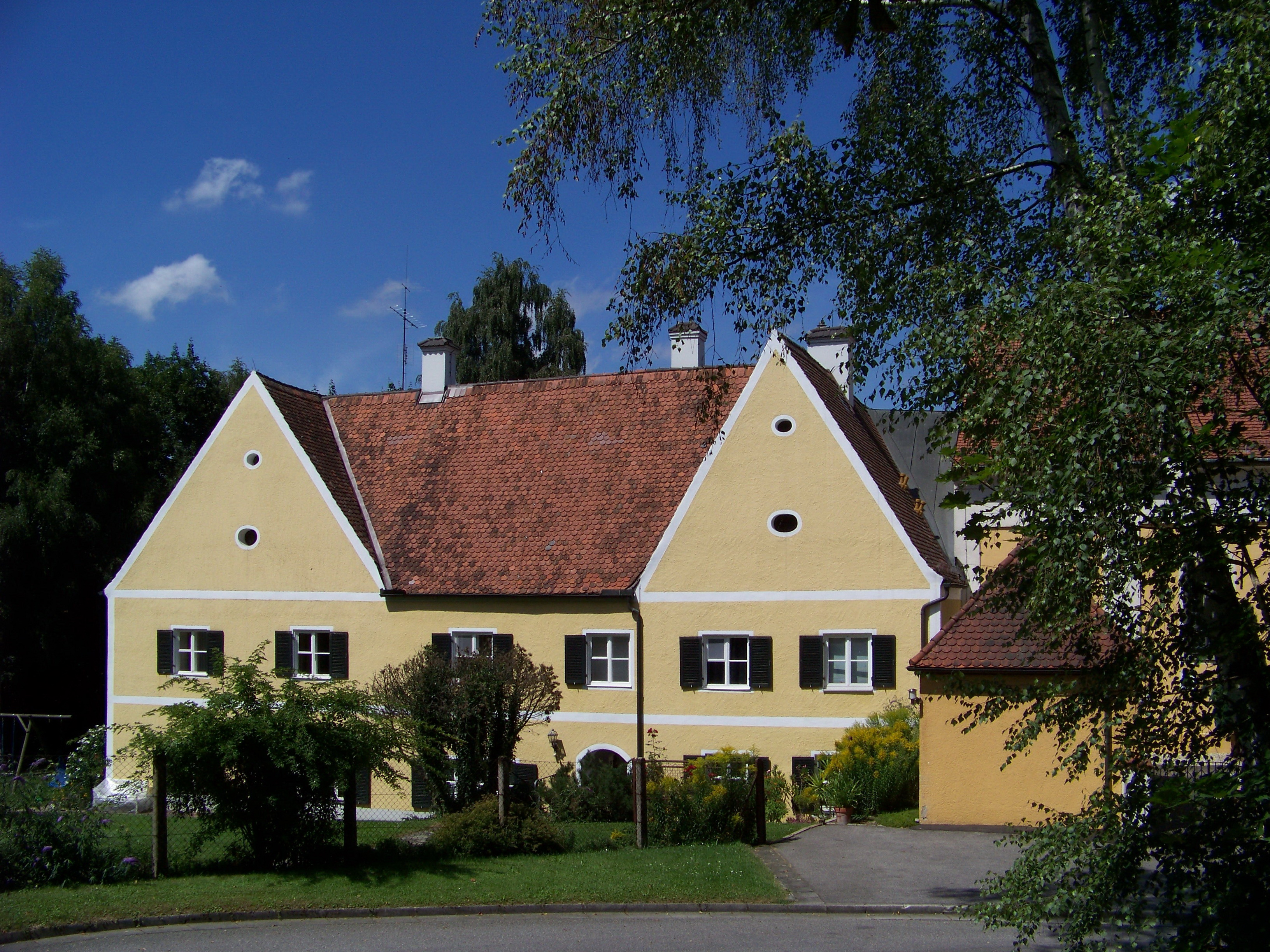 Schierling, Inkofen. Ehem. Hofmarkschloss, zweigeschossige Vierflügelanlage mit Satteldächern, um 1650, im Kern 16. Jahrhundert, an der Westwand Grabplatten des 15.-19. Jahrhundert.